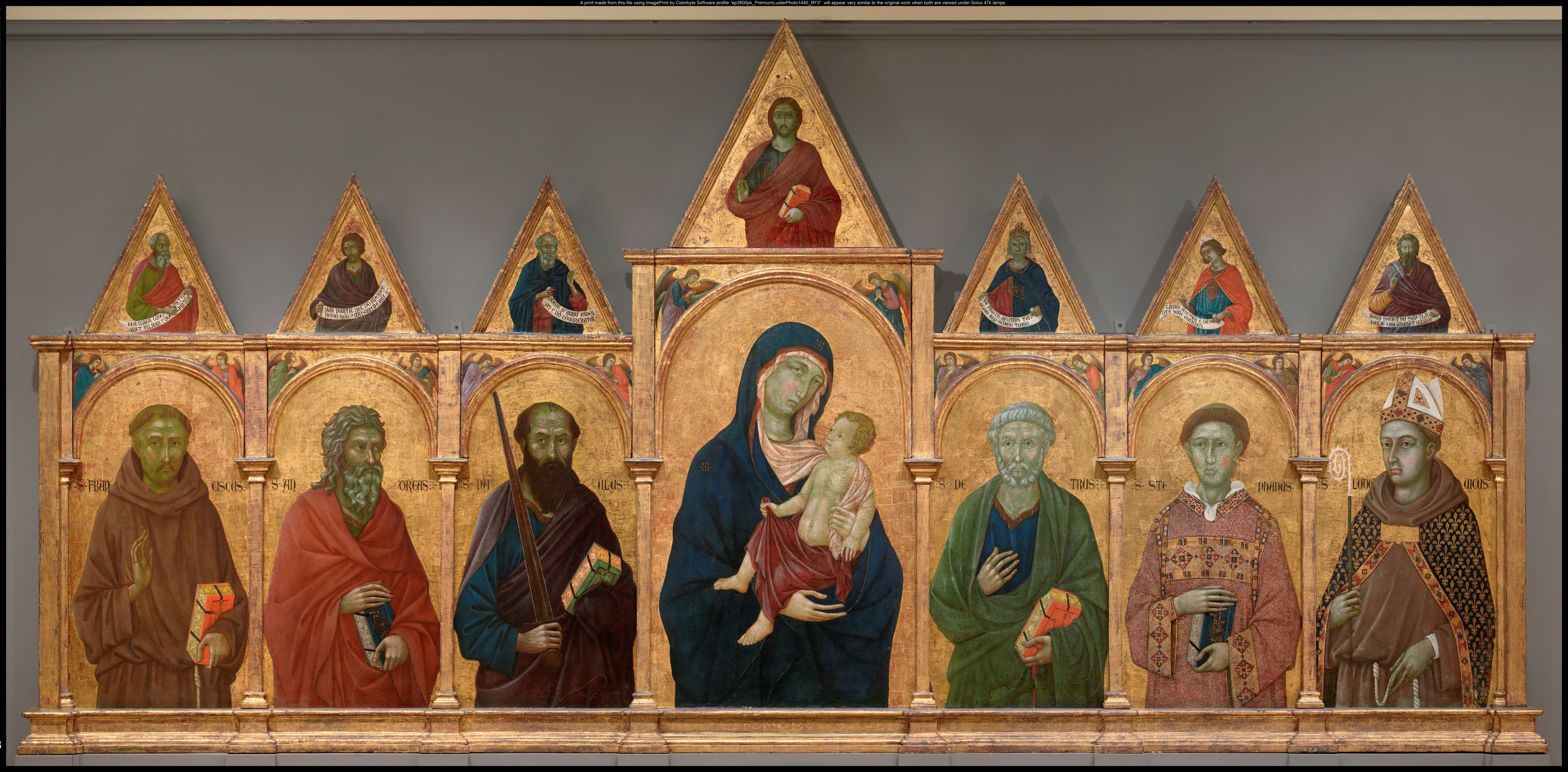 Polyptych.